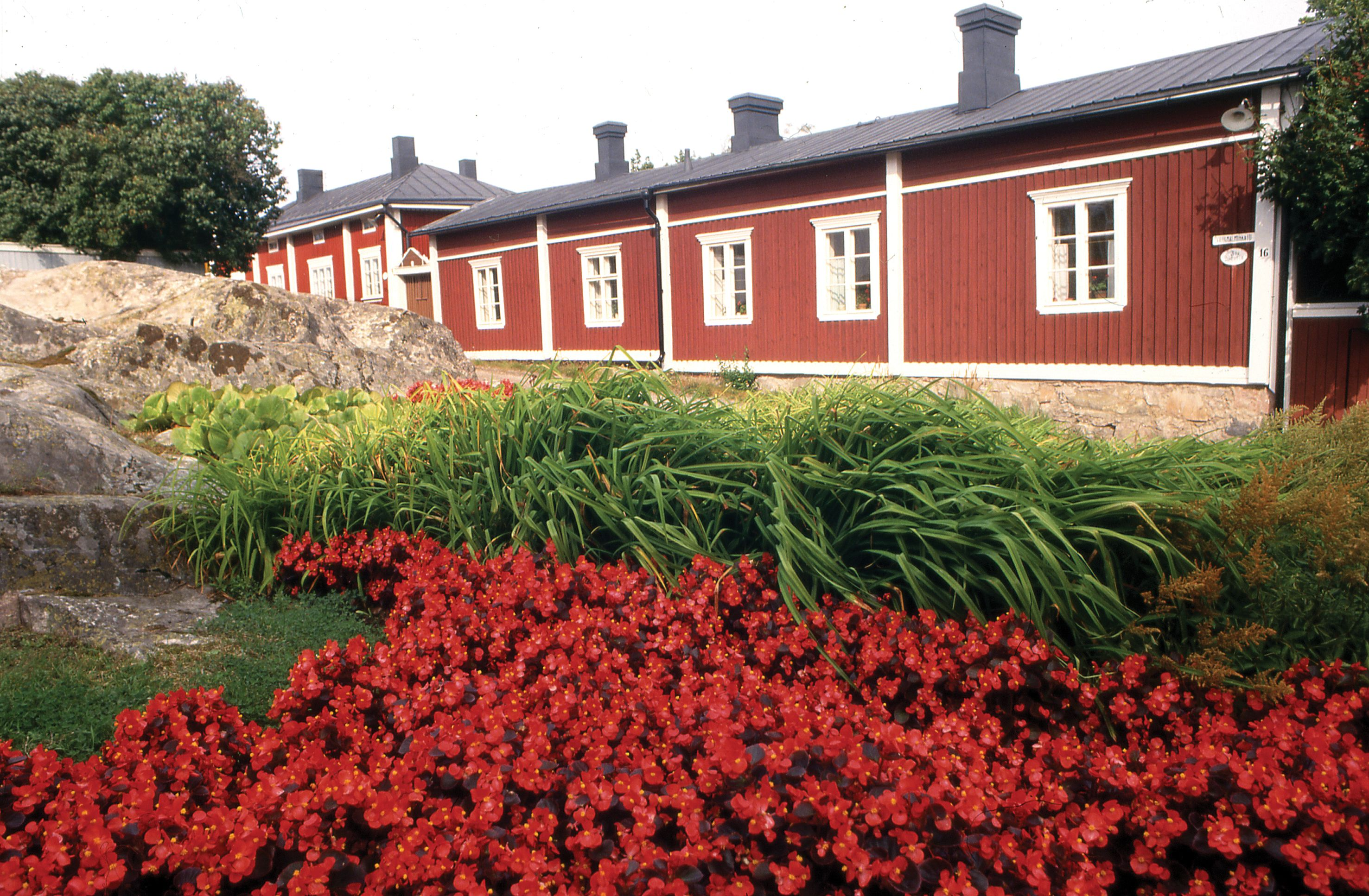 Old Rauma